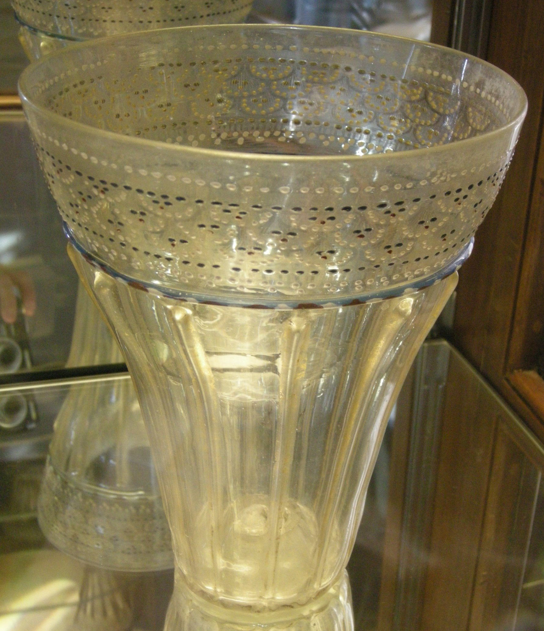 Murano, bicchiere barovier, 1475-1510 ca.